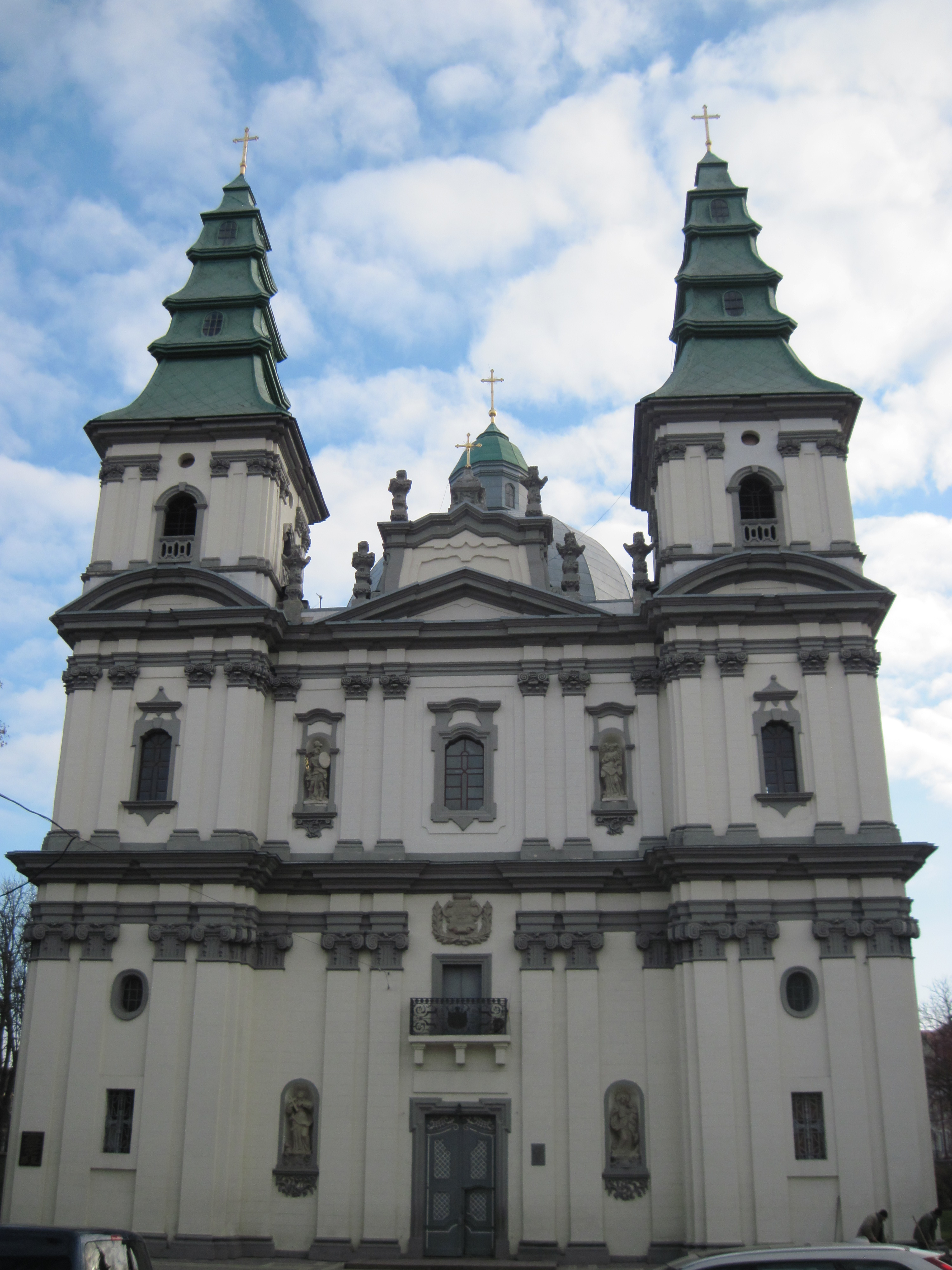 Фасад катедри УГКЦ Тернополя, осінь 2013